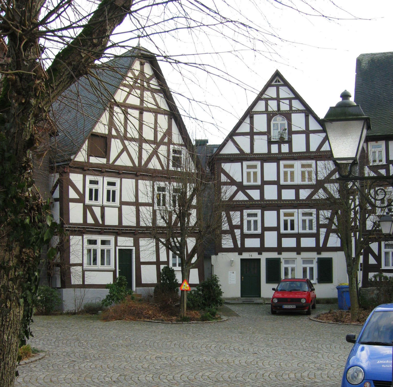 Fachwerkhäuser von etwa 1685 am Kirchplatz in Bad Laasphe (Nr. 14 - 18, von rechts), Foto 2003